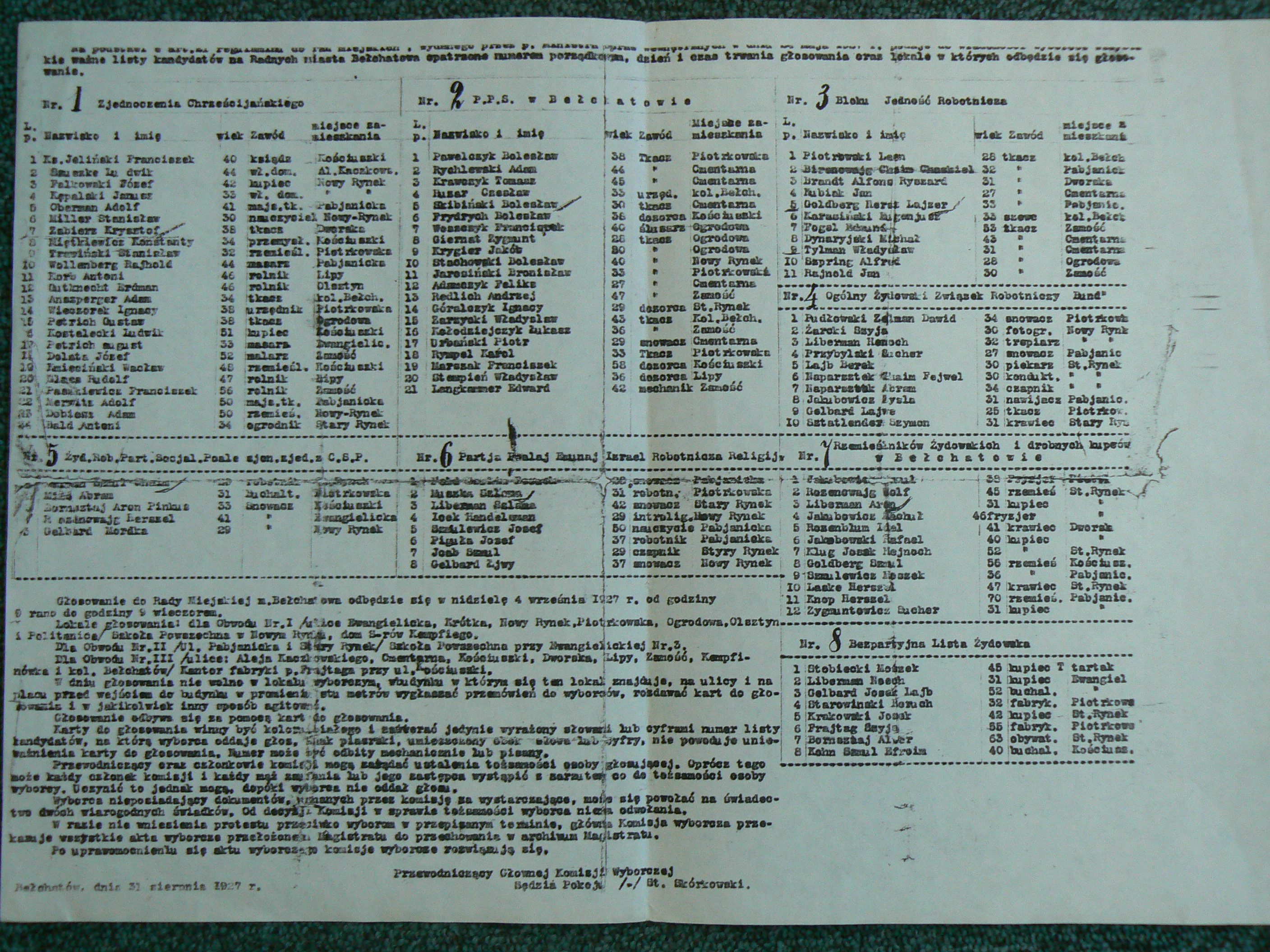 Ogłoszenie informujące o rozmieszczeniu lokali wyborczych oraz listach partyjnych w czasie wyborów do Rady Miejskiej w Bełchatowie w 1927 r. English Announcement inform about polling stations and lists of candidates during elections to the town council in Bełchatów (Poland), 31st August 1927